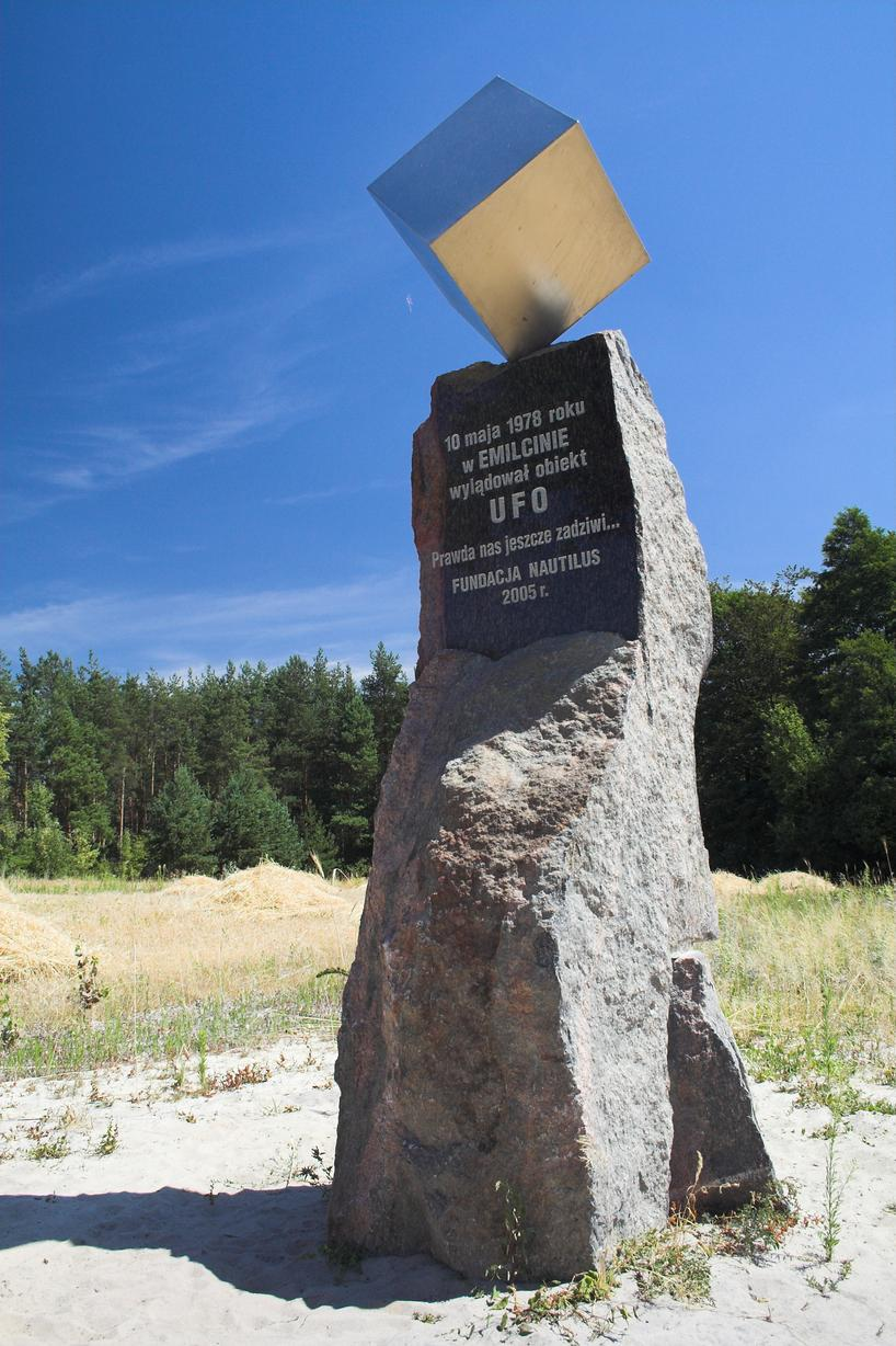 Pomnik UFO w Emilcinie (woj. Lubelskie)